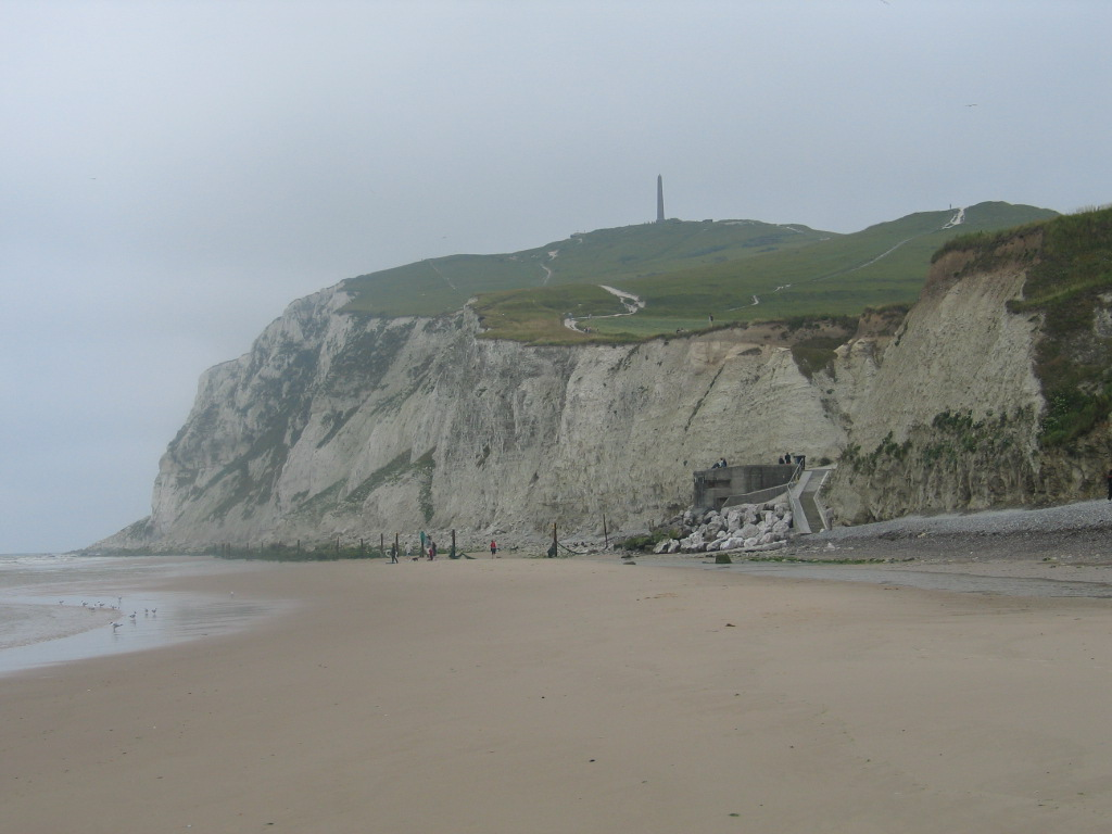 Cap Blanc Nez - eigen foto